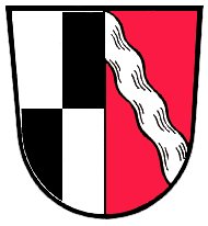 Der gevierte Zollernschild steht für die Burggrafen von Nürnberg, die zwischen 1281 und 1292 begannen, Güter in Windsbach zu erwerben. Der Schrägwellenbalken steht für die Fränkische Rezat. Als Landstadt der Hohenzollern führte Windsbach seit 1402 nur den gevierten Zollernschild mit dem Brackenkopf als Helmzier in seinen Siegeln. In einem Siegel von 1610 erscheint es erstmals als Doppelwappen, das Markgraf Joachim Ernst von Brandenburg-Ansbach 1614 mit einem Wappenbrief bestätigte: Rechts die Vierung und links in Rot ein schräglinker grüner Wellenbalken. Seit der Bürgermeistermedaille von 1819 stehen beide Wappen in einem Schild und der Wellenbalken in Silber.